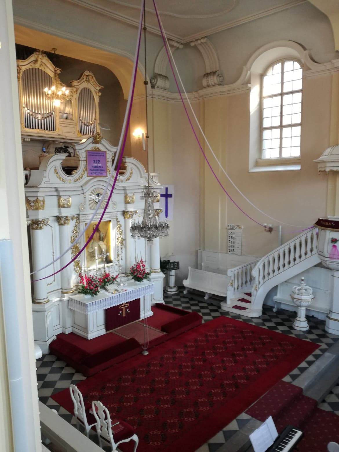 Kościół ewangelicki w Pszczynie w dzień uroczystości pamiątki poświęcenia kościoła